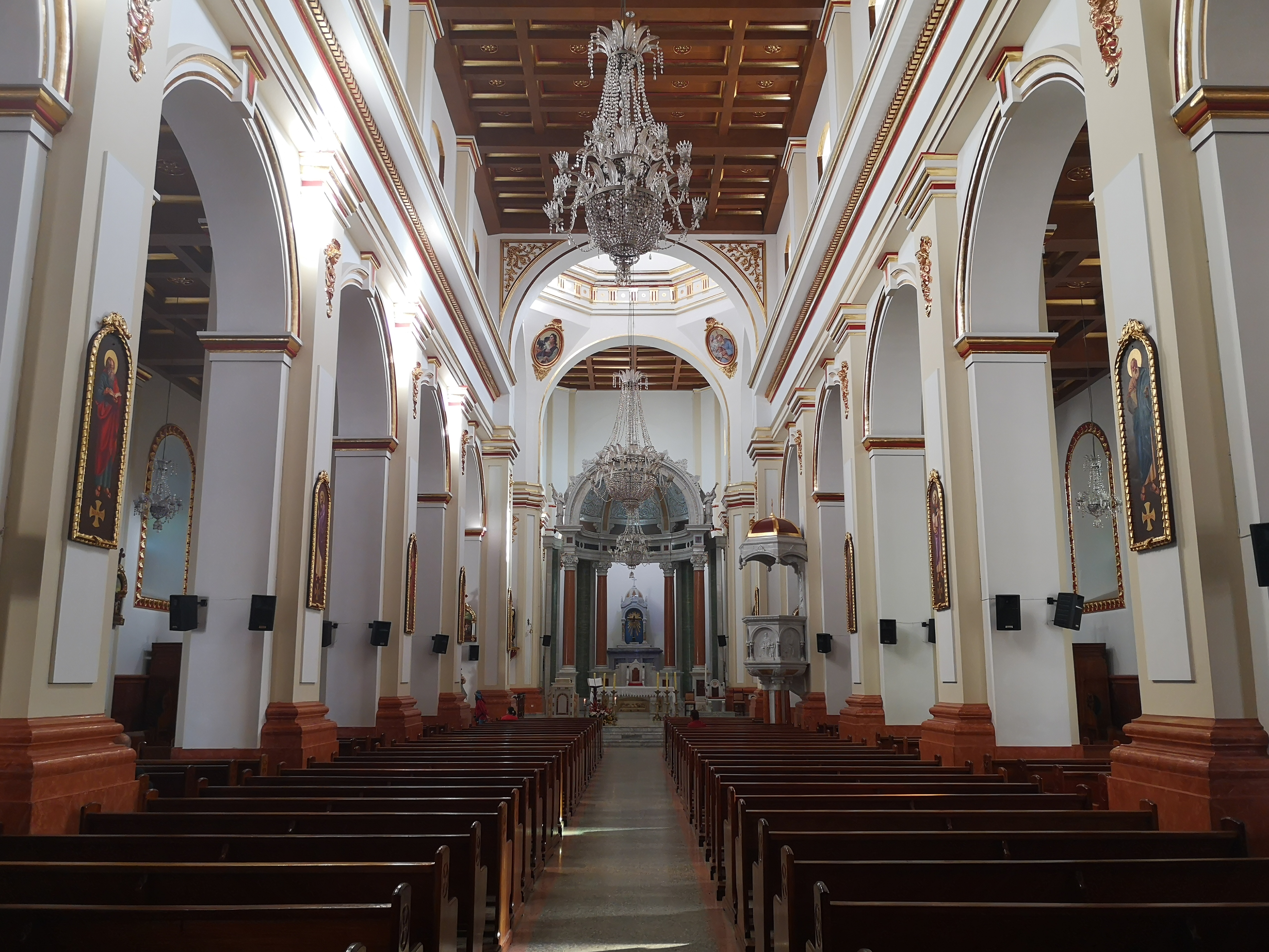 Catedral de Santa Rosa de Osos